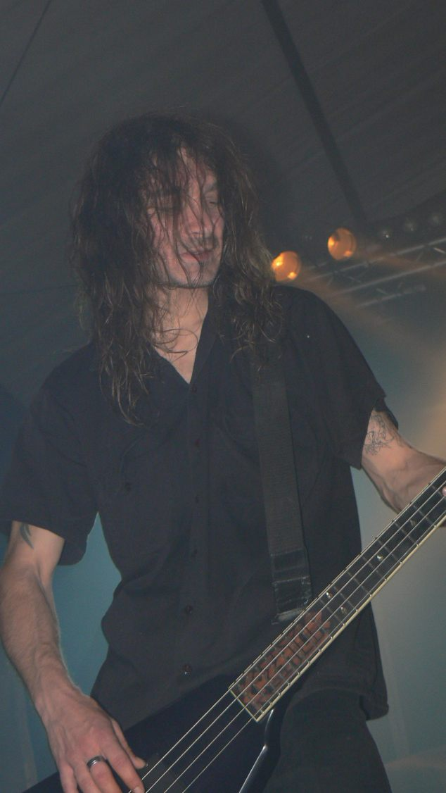 Christian "Speesy" Giesler, bassist of Kreator.